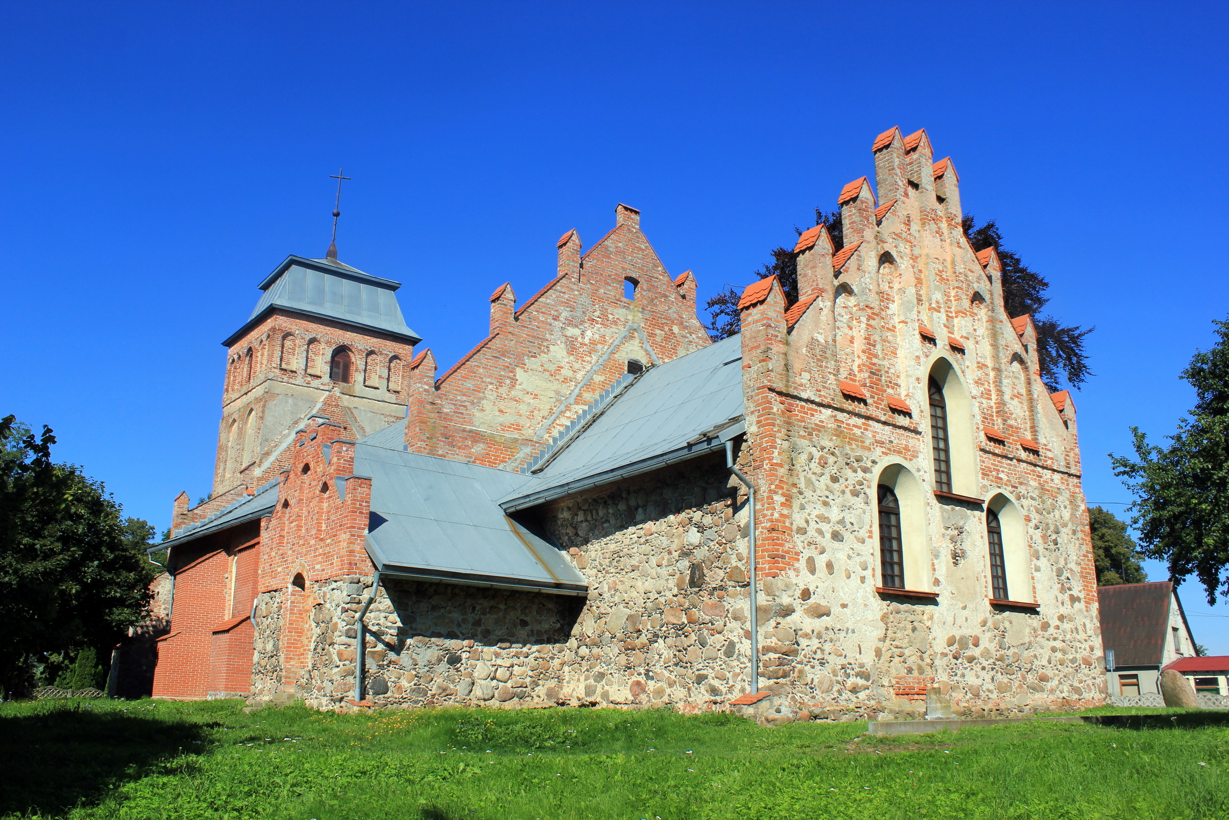 Kirche in Groß Legitten (heute Turgenewo, Oblast Kaliningrad).